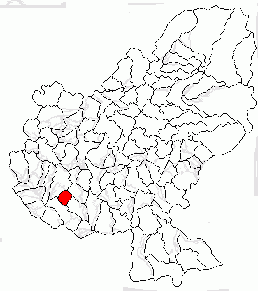 Categorie:Hărţi ale judeţului Mureş